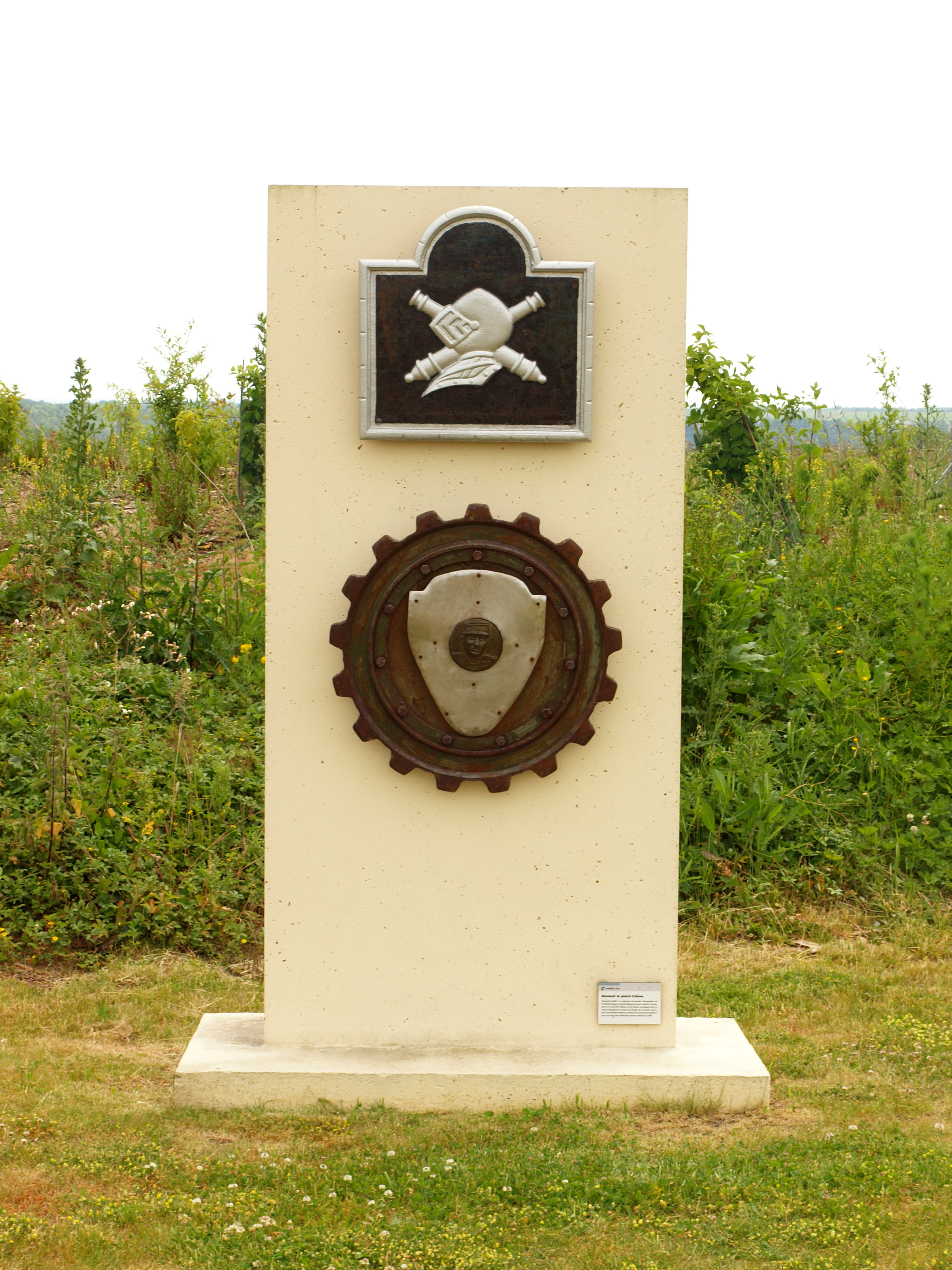 Jardin mémorial du Moulin de Laffaux (Aisne, France)